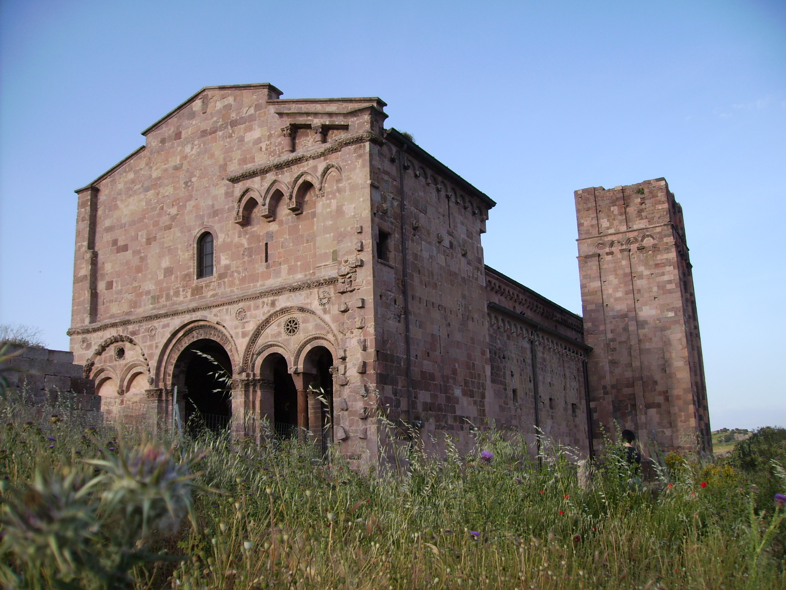 Sant`Antioco_di_Bisarcio, Logudoro, Sardinien